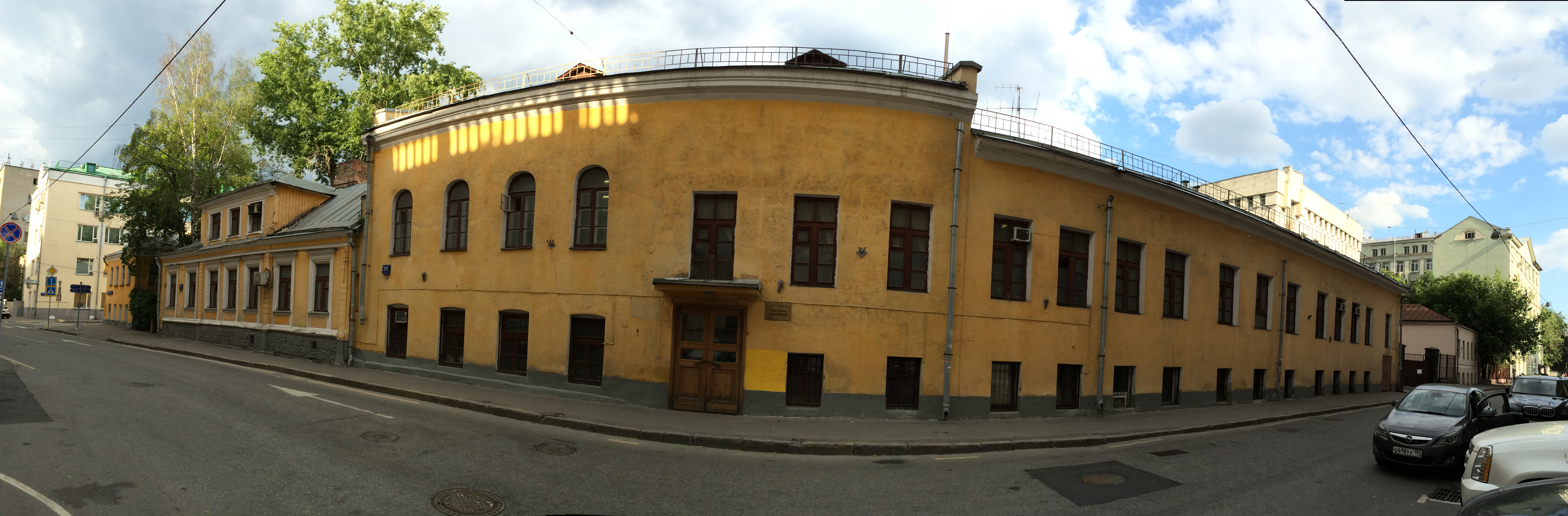 Institute of geography. Russian Academy of sciences. Moscow Russia. Институт географии АН СССР. Москва, угол Старомонетного и Пыжевского переулков.